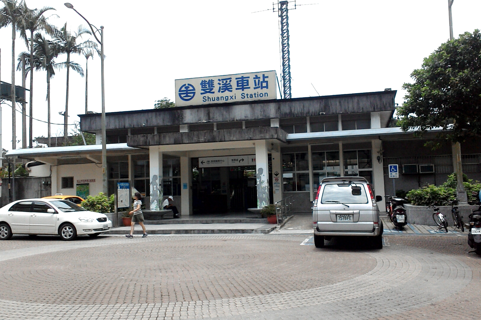 台鐵雙溪車站,新北市雙溪區牡丹里